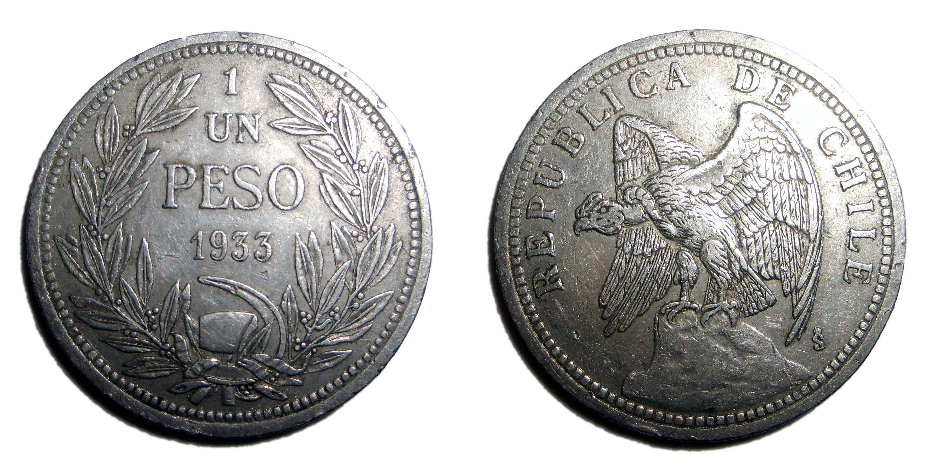 Moneda de 1peso chileno del año 1933.